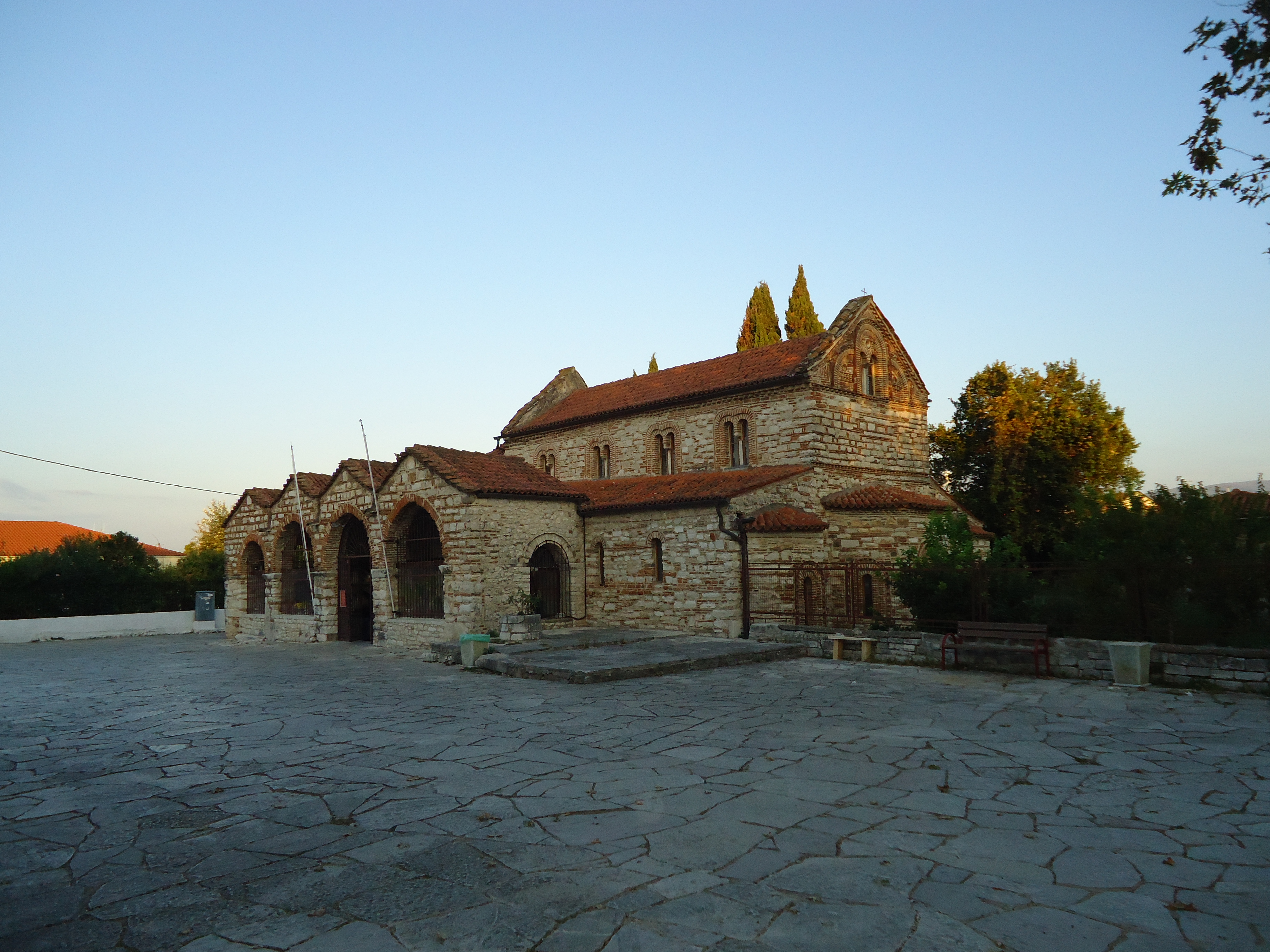 Η Αγία Θεοδώρα της Άρτας.